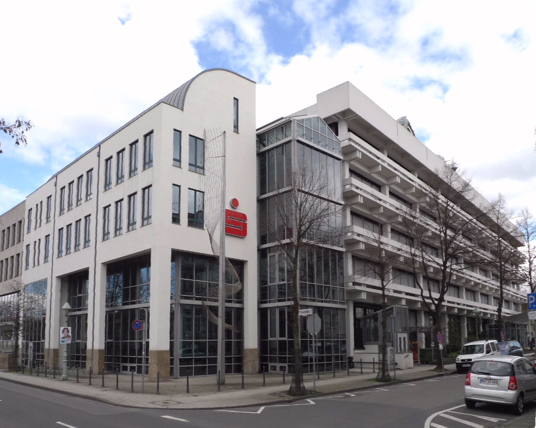 Rechts: Gebäude des Sparkassen- und Giroverbandes, Architekt: Ernst van Dorp, 1970/71 – Links: Erweiterungsbau des Sparkassen- und Giroverbandes, Architekt: Karl-Heinz Schommer, Fertigstellung: 1992 – Südstadt, Bonn